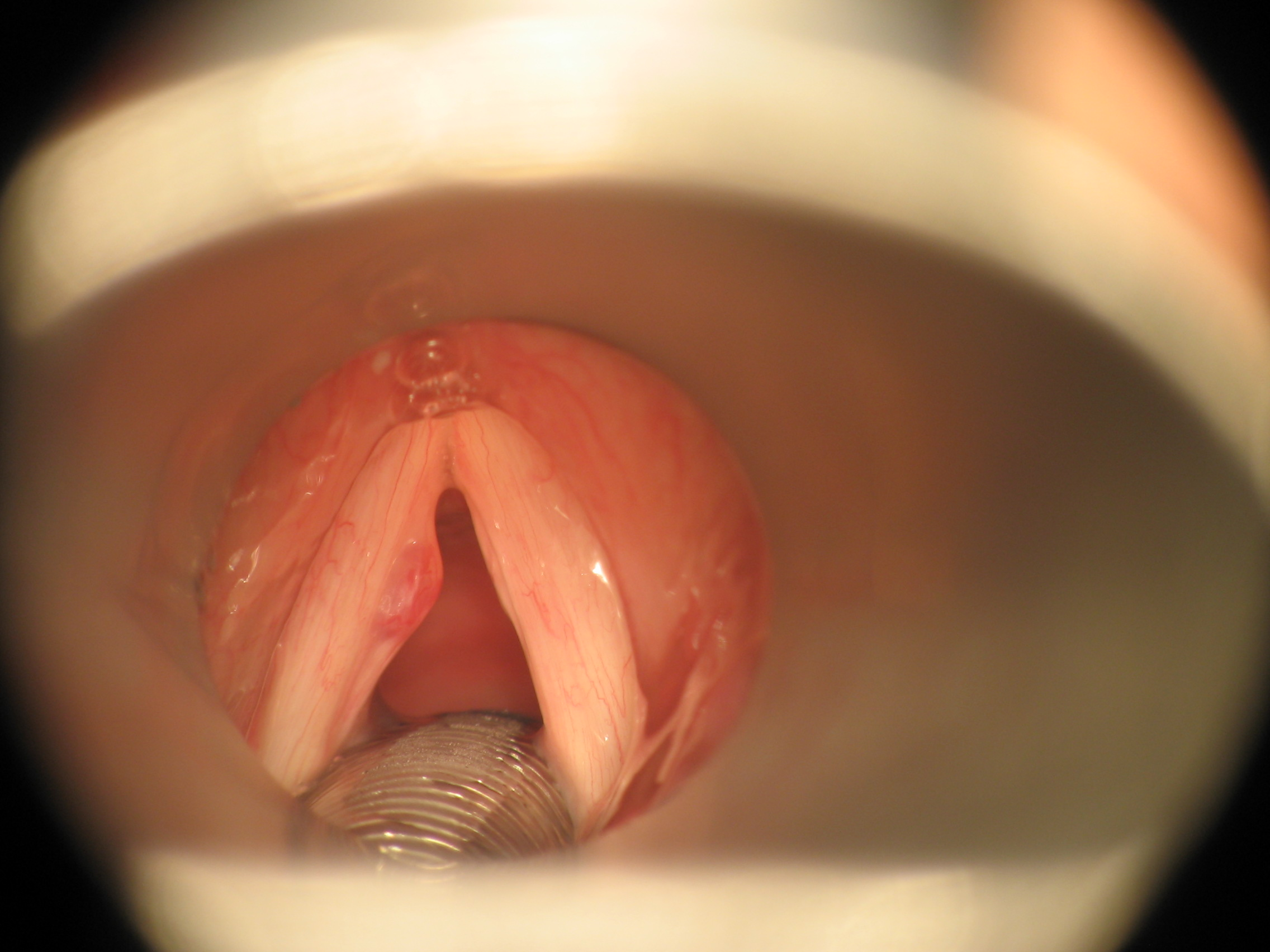 teleangiektatischer Stimmbandpolyp links, Blick auf die Stimmbänder durch das Metallrohr der Mikrolaryngoskopie